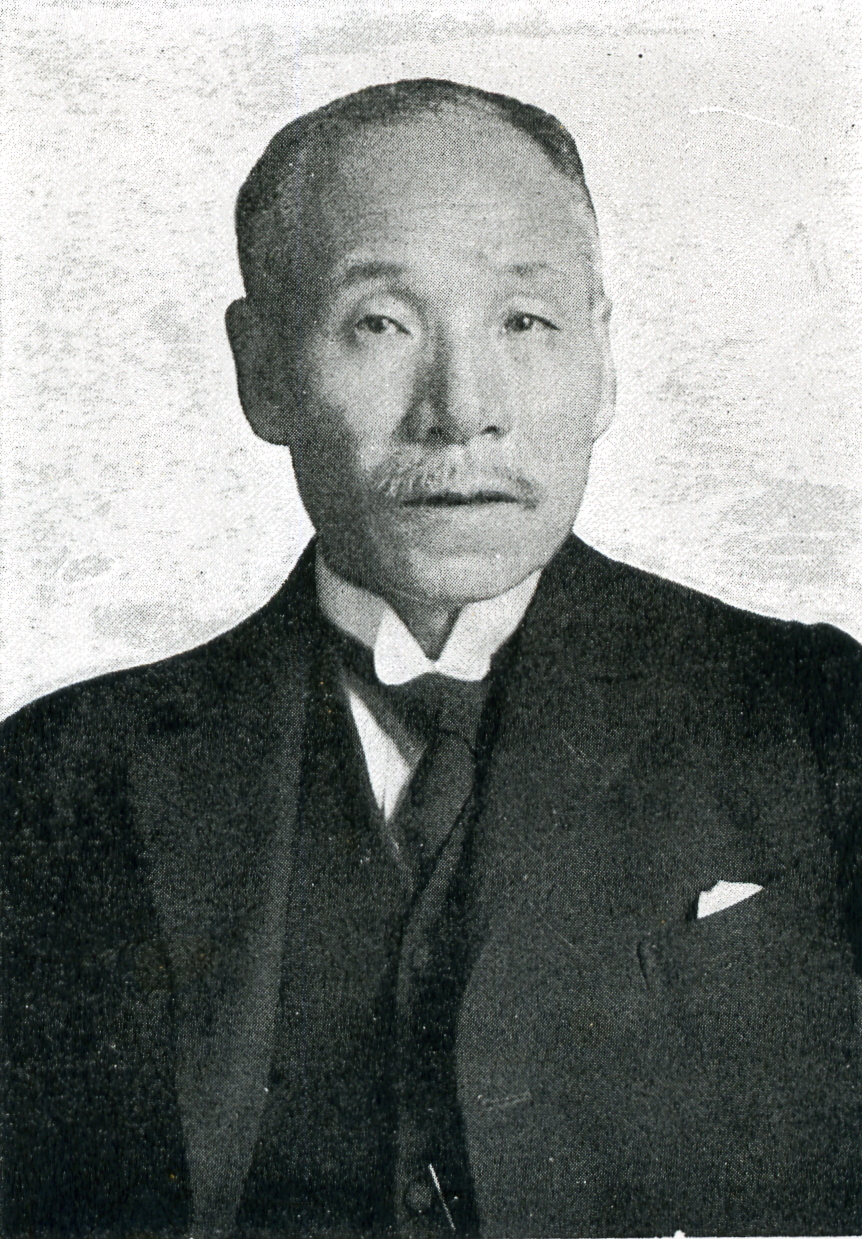 この写真は、1932年における水野錬太郎（1868-1949）の写真です。